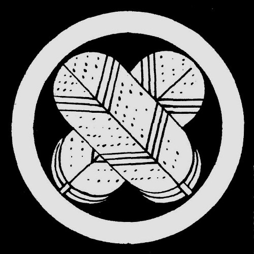 丸に違い鷹の羽